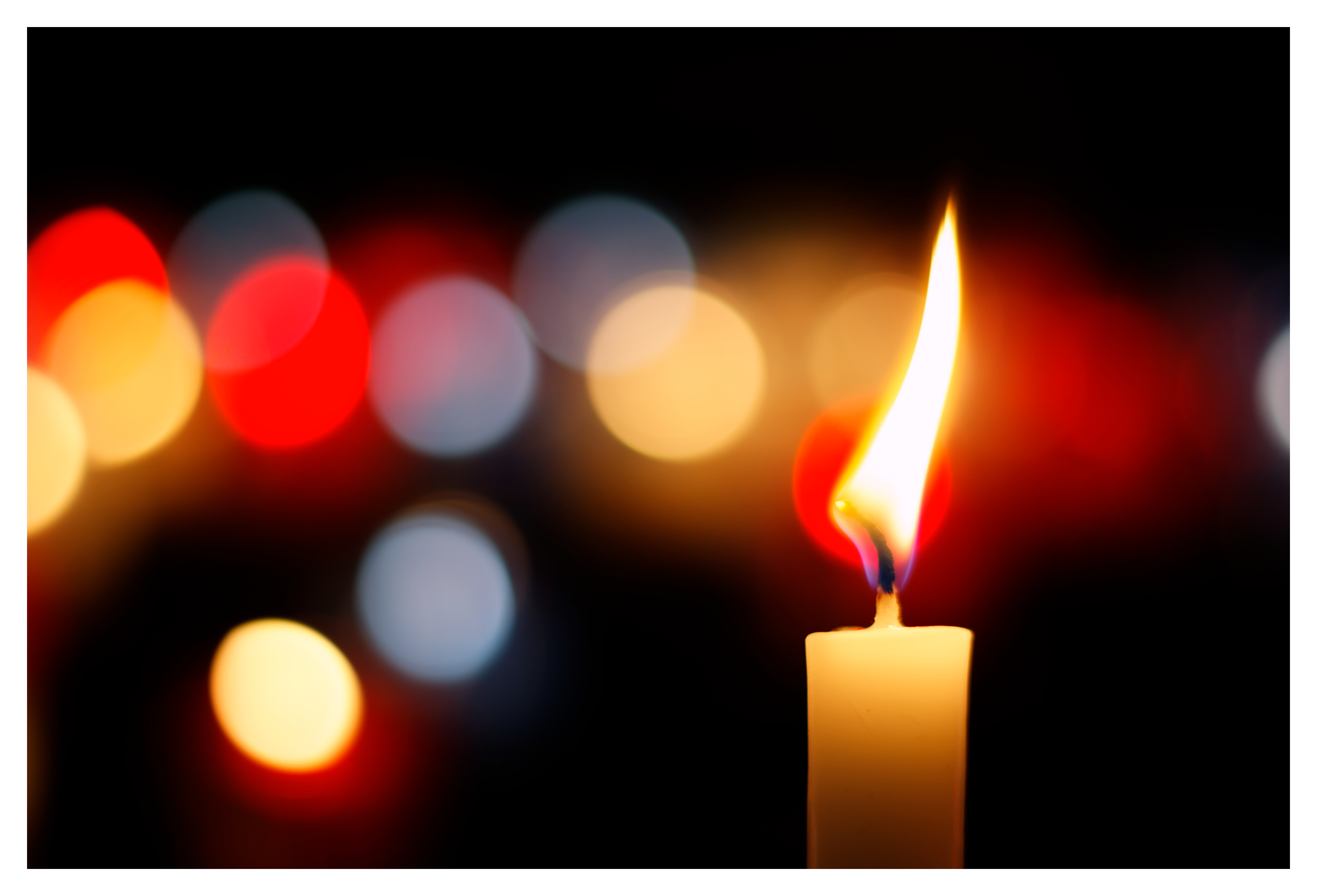 Basilique Notre Dame de Fourvière